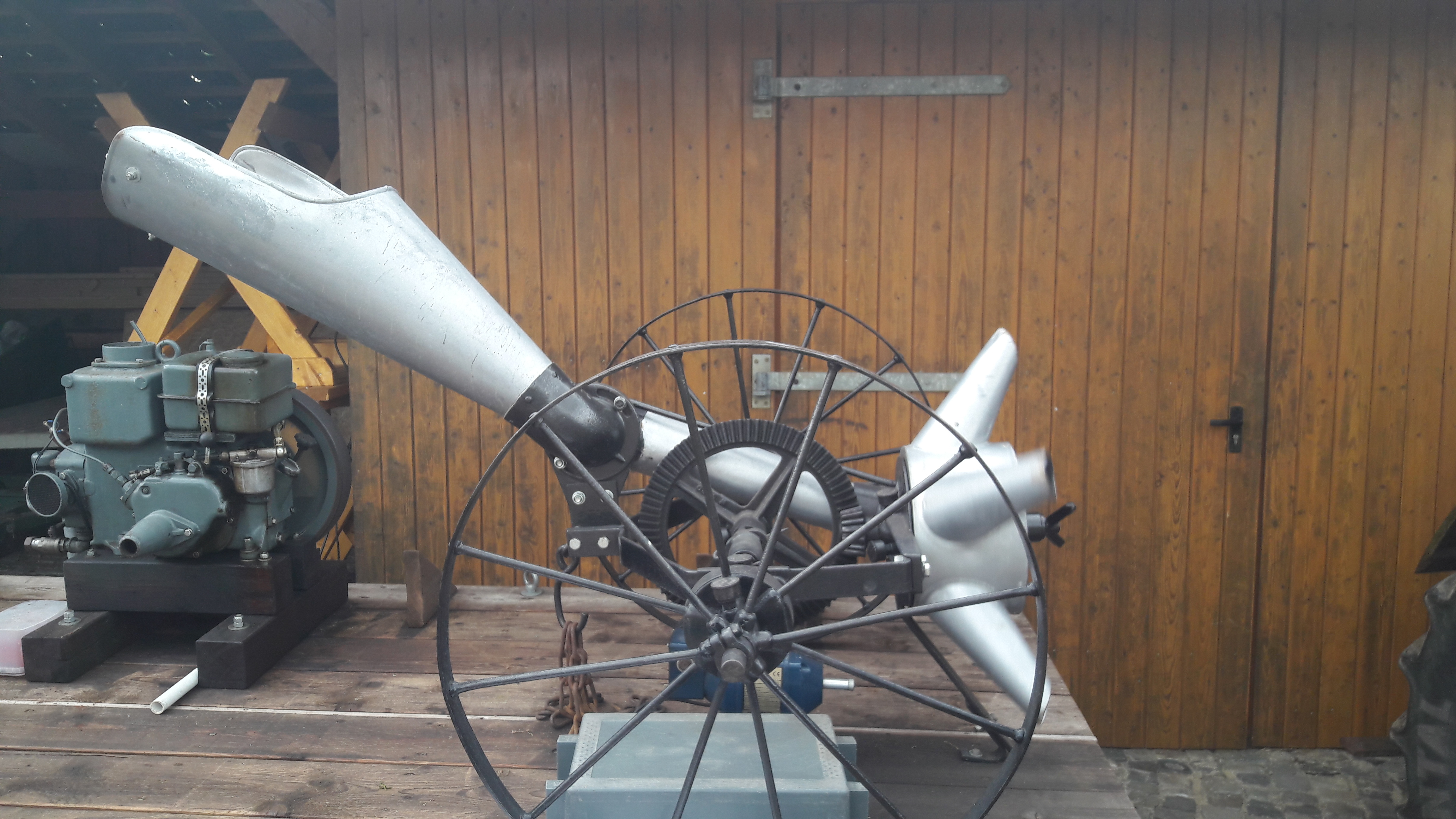 Eine Jaucheschleuder wurde hinter das Jauchefass gespannt und hat durch die Drehbewegung den Aktionsradius erhöht. Hersteller: August Wagner, Maschinen Fabrik Kirschau Gesehen R. Brüggemann Drebber